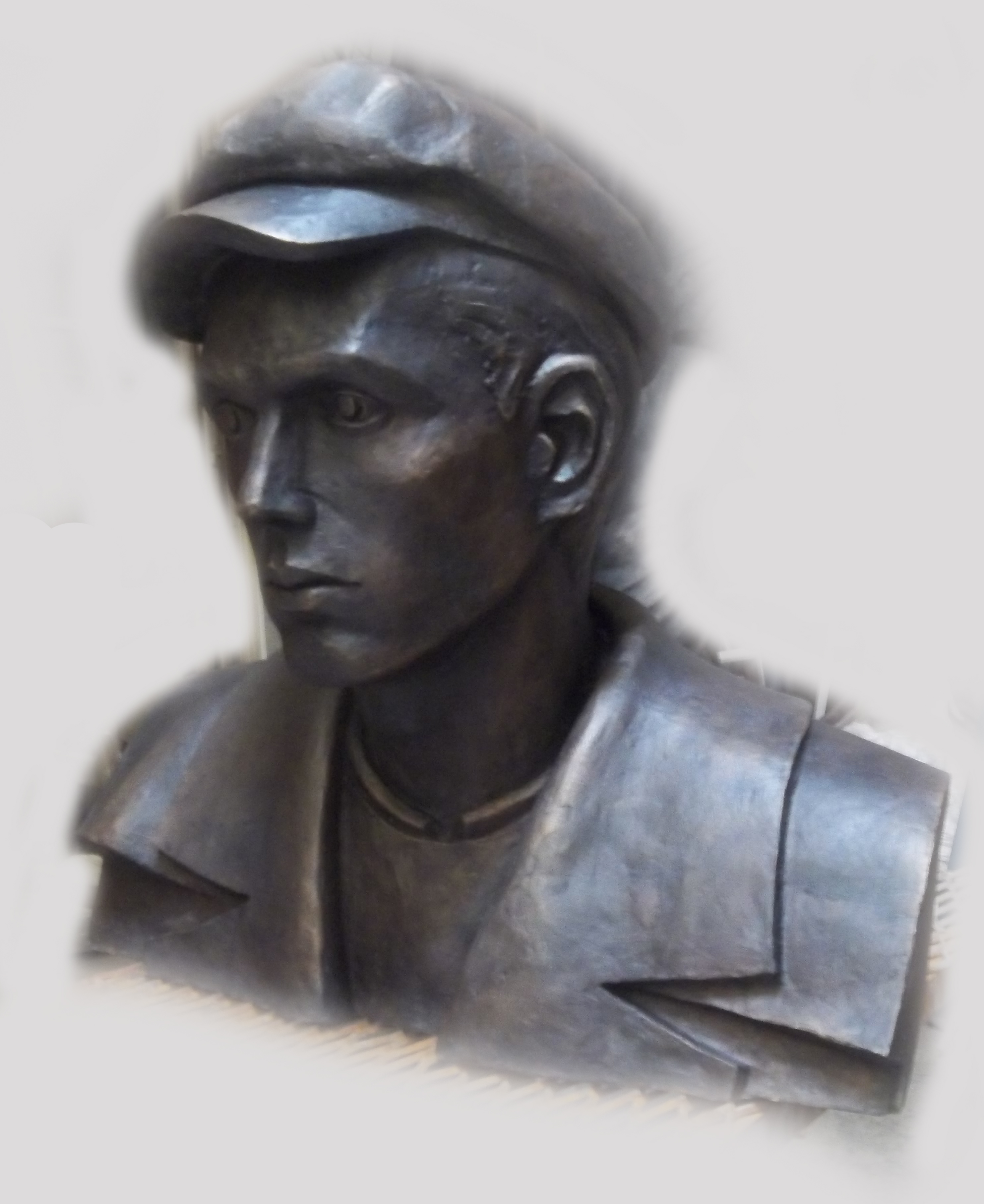 Busto de Hugo Alberto Acuña. Se encuentra en el Paseo de los Héroes antárticos en la ciudad de Ushuaia